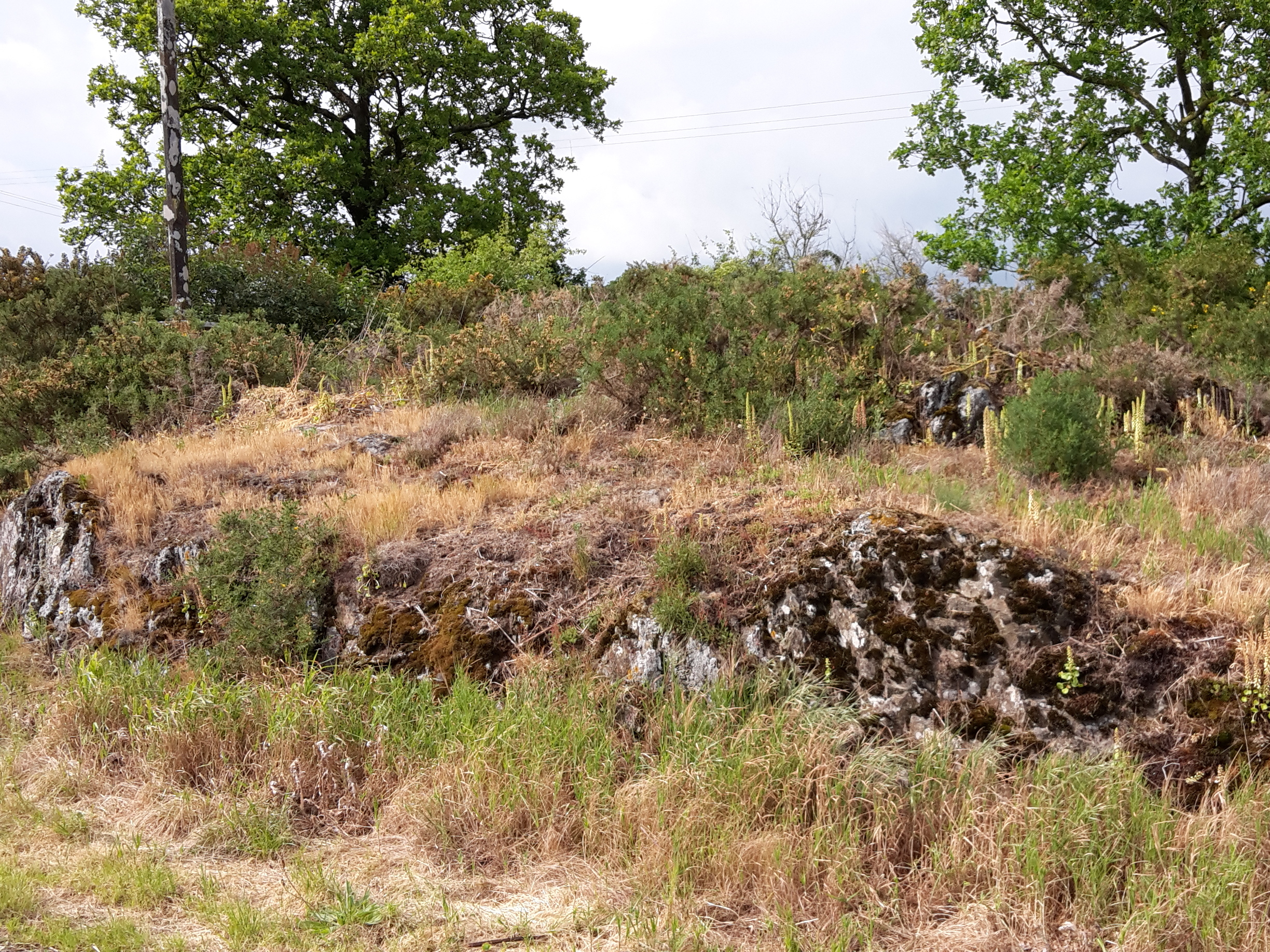 Affleurement de schiste à Rochementru, Le Pin, Loire-Atlantique, France.